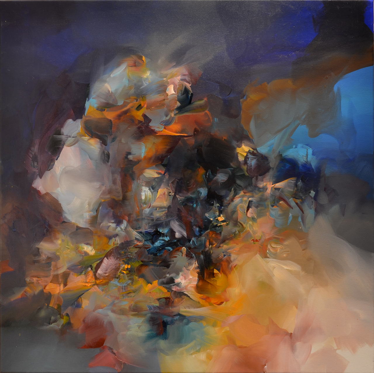 Pavel Vašíček, V okamžiku (2017), olej na plátně, 100 x 100 cm